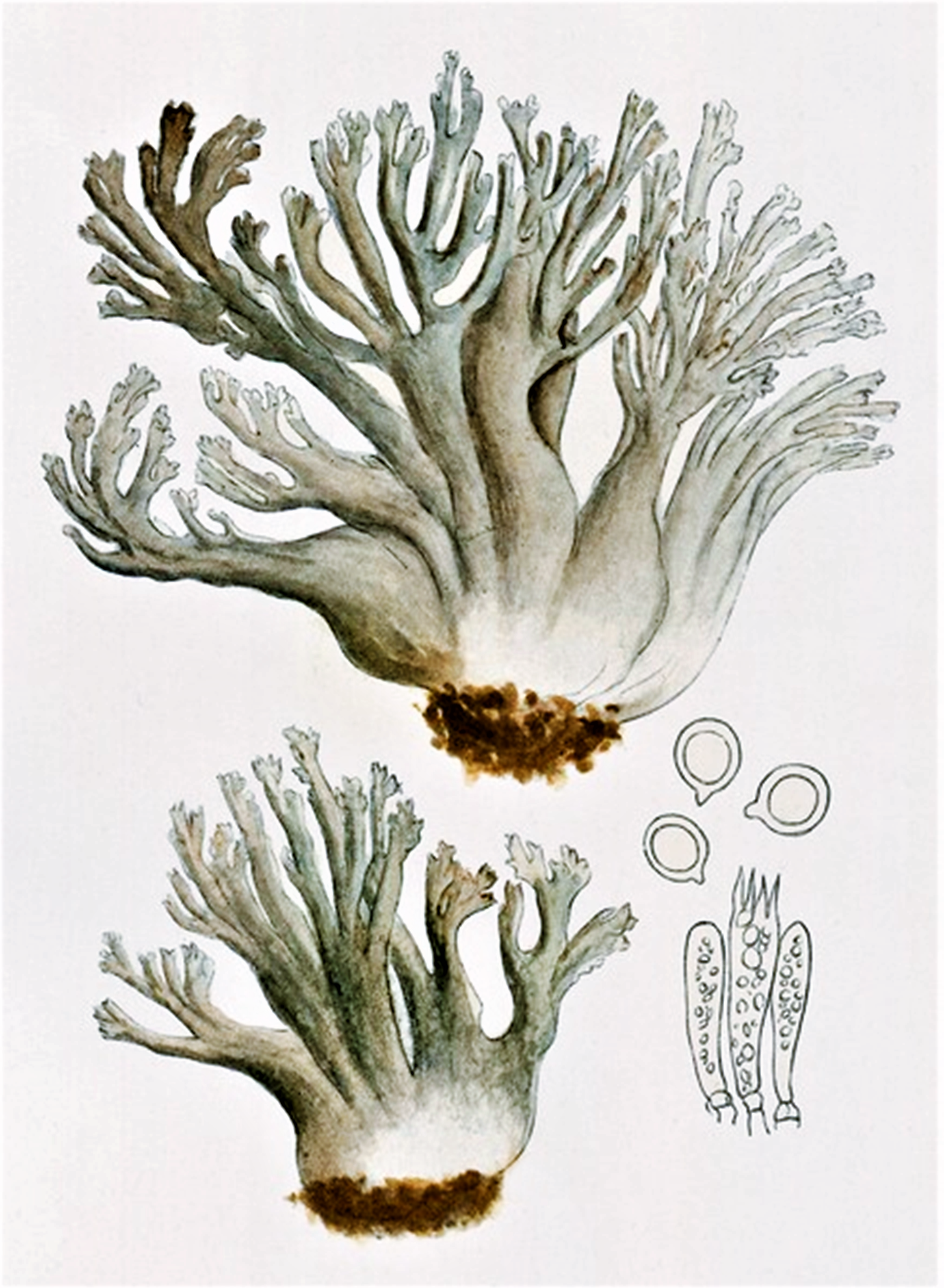 Giacomo Bresadola: Clavaria cinerea (Bull.) (1788), heute: Clavulina cinerea (Bull.) J.Schröt. (1888)